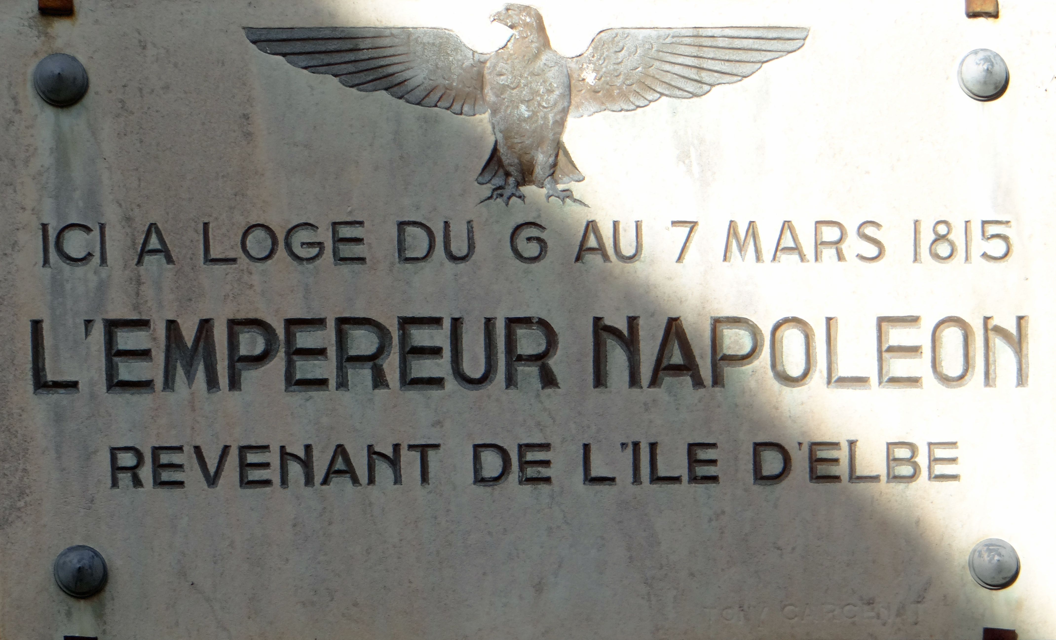 Corps - Maison Napoléon - Plaque commémorative (la tête de l'aigle a été tournée du mauvais côté)